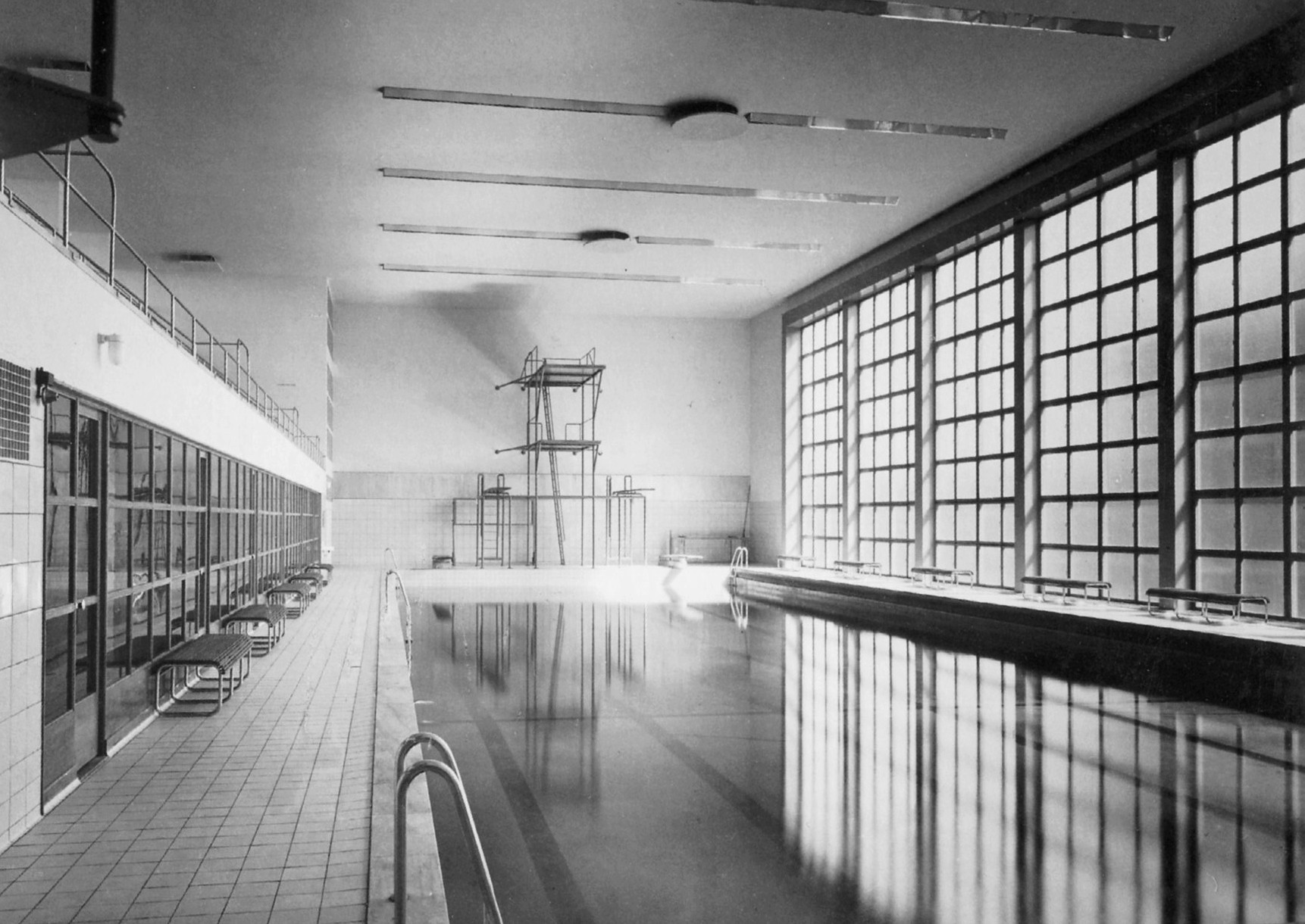 Eskilstuna badhus (numera kallat "Vattenpalatset")